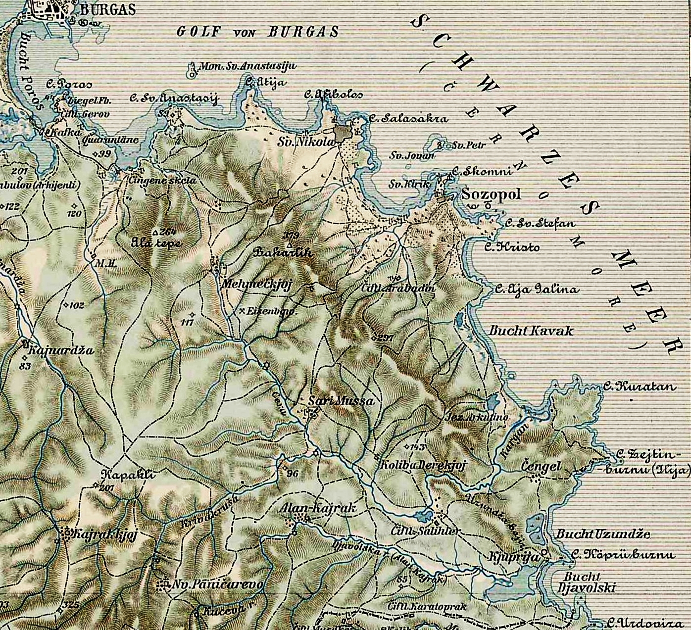 Sozopol und sein Umland (1903)